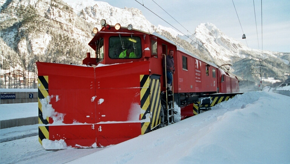 Klimaschneepflug in der Haltestelle Schnann